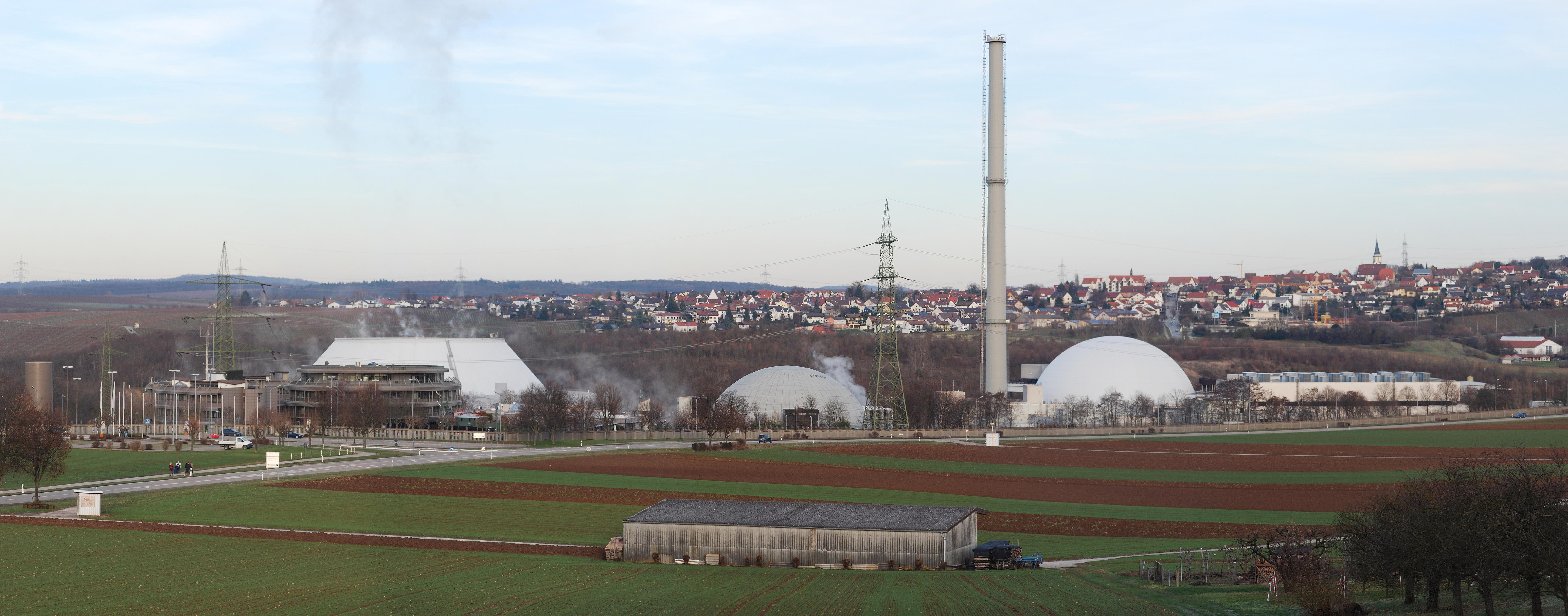 Panorama Kernkraftwerk Neckarwestheim, Teil 1